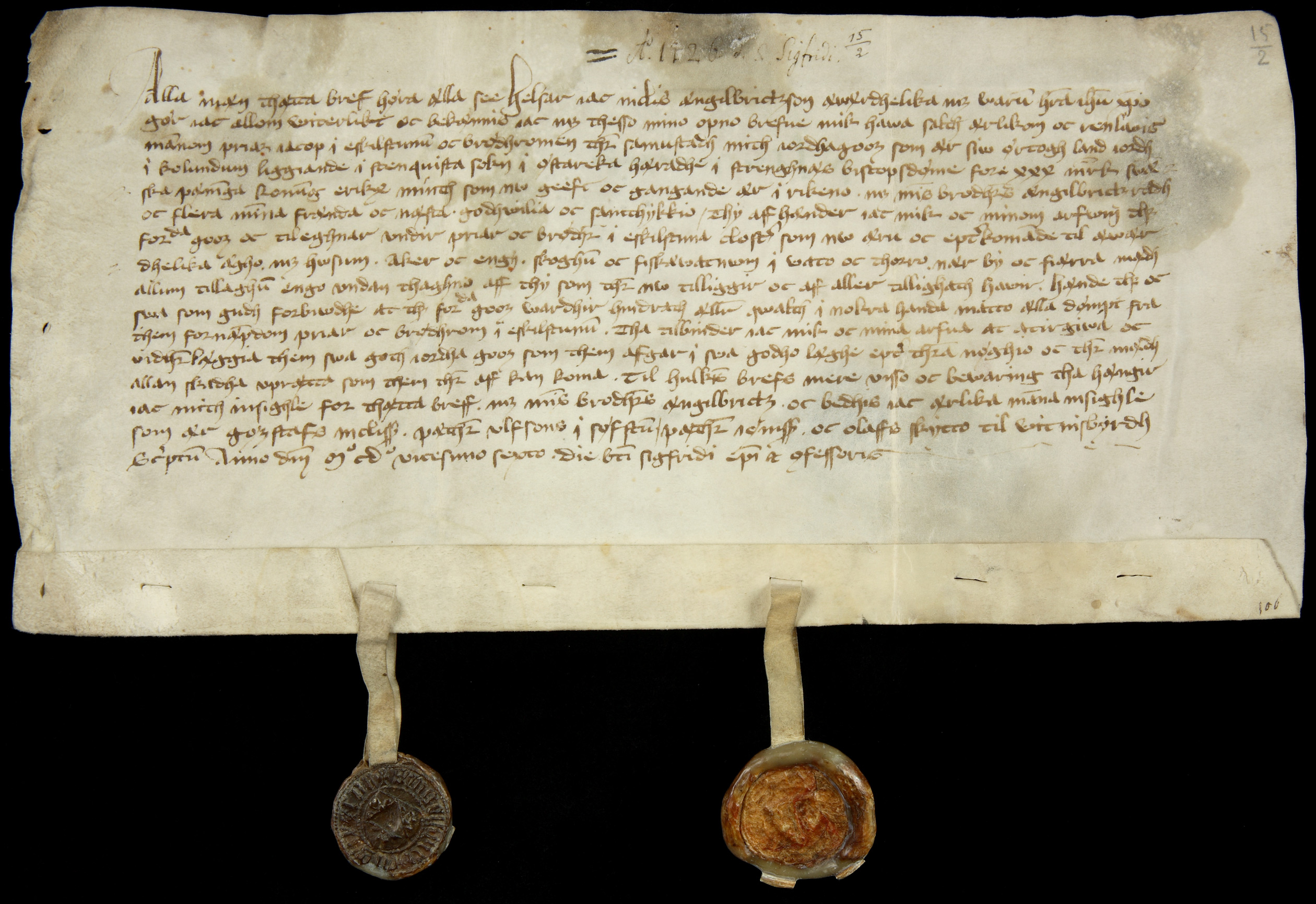 Nils Engelbrektsson säljer till prior Jakob i Eskilstuna kloster och bröderna där 7 örtugland jord i Kolunda i Stenkvista socken i Österrekarne för 30 mark svenska penningar. Försäljningen sker med brodern Engelbrekts råd och flera fränders samtycke. Brevutfärdaren, brodern Engelbrekt, Gustav Nilsson, Peter Ulfsson i Söfsta (Stenkvista socken), Peter Jönsson och Olof Skytte beseglar. De två bevarade sigillen är Engelbrekt Engelbrektssons och (troligen) Peter Ulfssons.